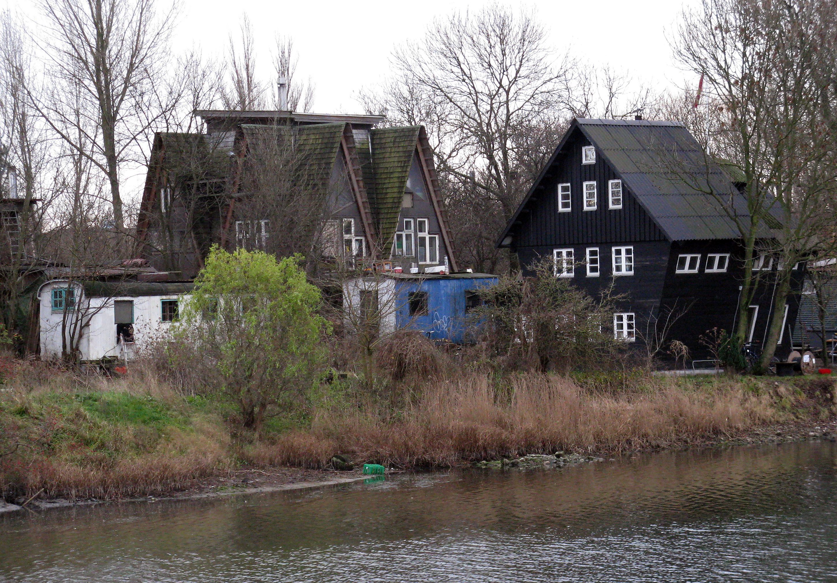 Huse på Volden, Christiania, Copenhagen